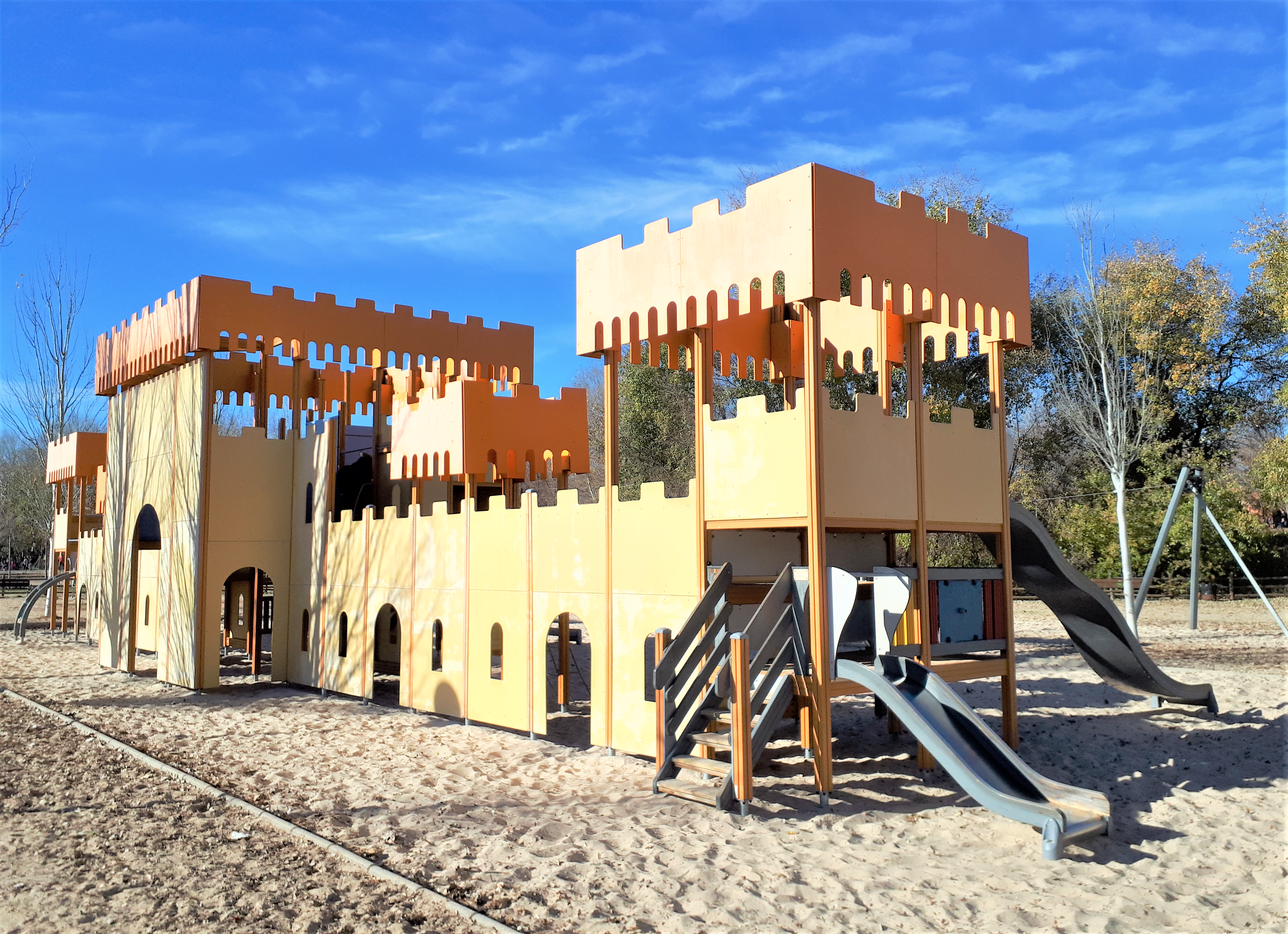 Espacio recreativo infantil en forma de castillo. Ubicado en el parque "Isla del Colegio" en Alcalá de Henares (Comunidad de Madrid - España).